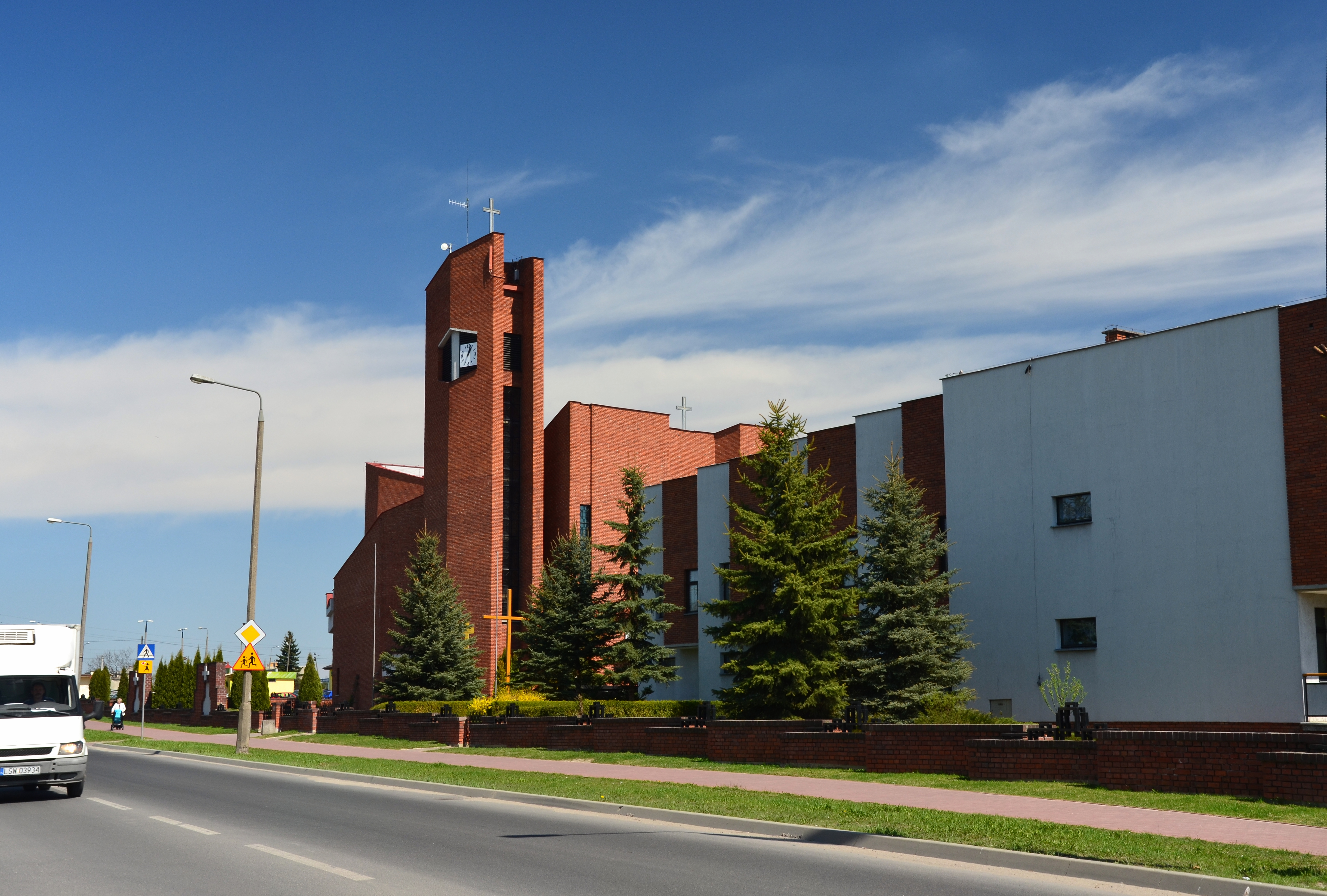 Kościół p.w. Chrystusa Odkupiciela w Świdniku, powiat Lublin